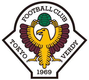 도쿄 베르디 클럽 엠블럼